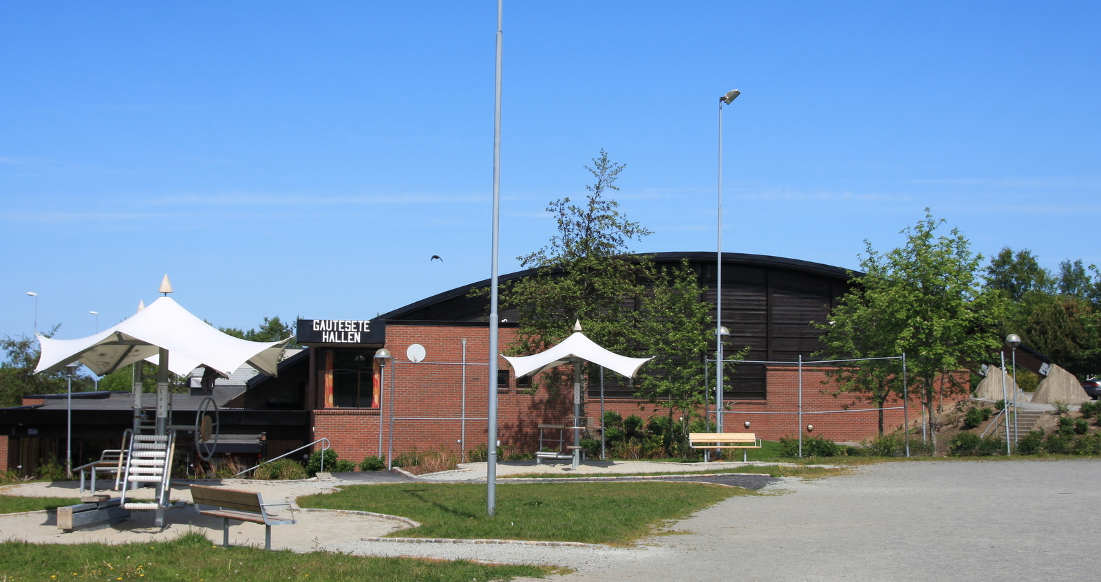 Gautesetehallen